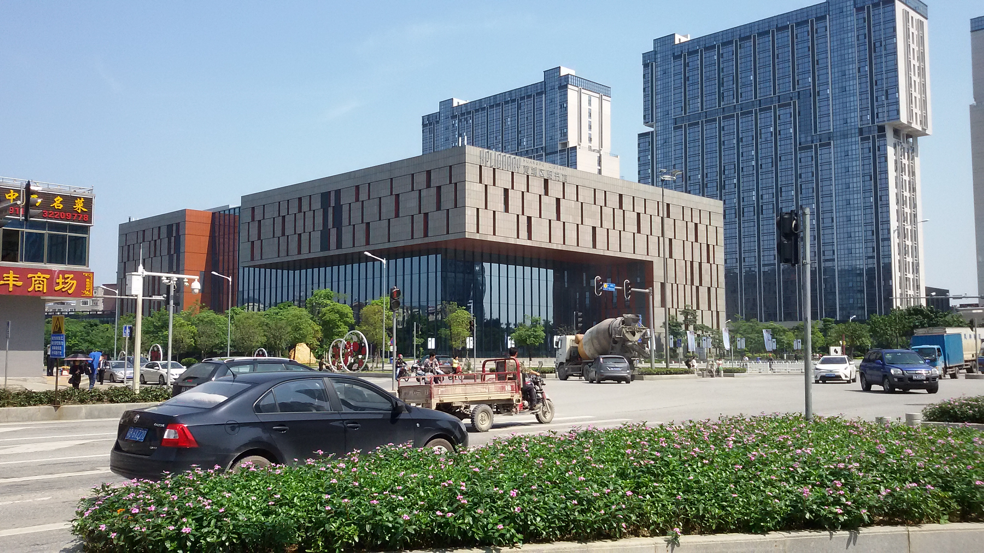 粵語: 黃埔區圖書館（香雪館）